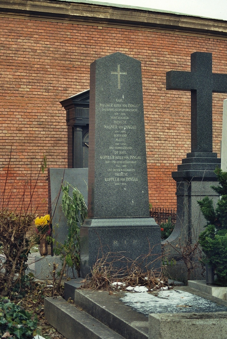 Wiener Zentralfriedhof - Gruppe 31A, Grab des 1879 in den österreichischen Ritterstand erhobenen k.k. Handelsgerichts-Präsidenten Dr. Karl Wagner von Inngau (1819–1893), seiner Gemahlin Theresia († 1893) und Tochter Therese (1852–1938) sowie seines Schwiegersohns, des k.u.k. Hof- und Gerichtsadvokaten Dr. Karl Koppler (1844–1918), auf den 1883 der Ritterstand, das Prädikat "von Inngau" und das Wappen des Dr. Karl Wagner von Inngau übertragen wurde.